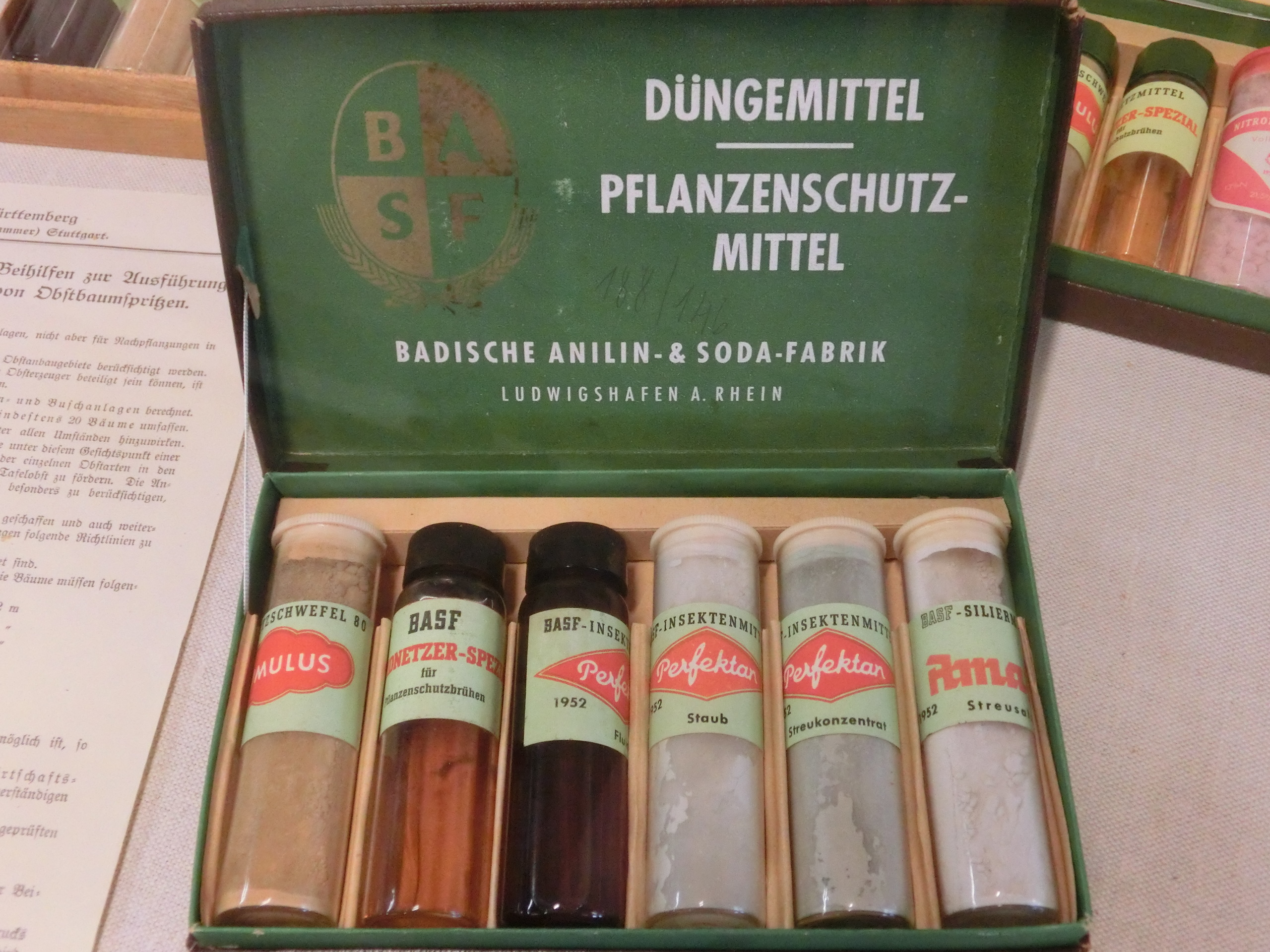 Deutschland - Baden-Württemberg - Landkreis Biberach - Bad Schussenried: Ausstellungsstück im Oberschwäbischen Museumsdorf Kürnbach